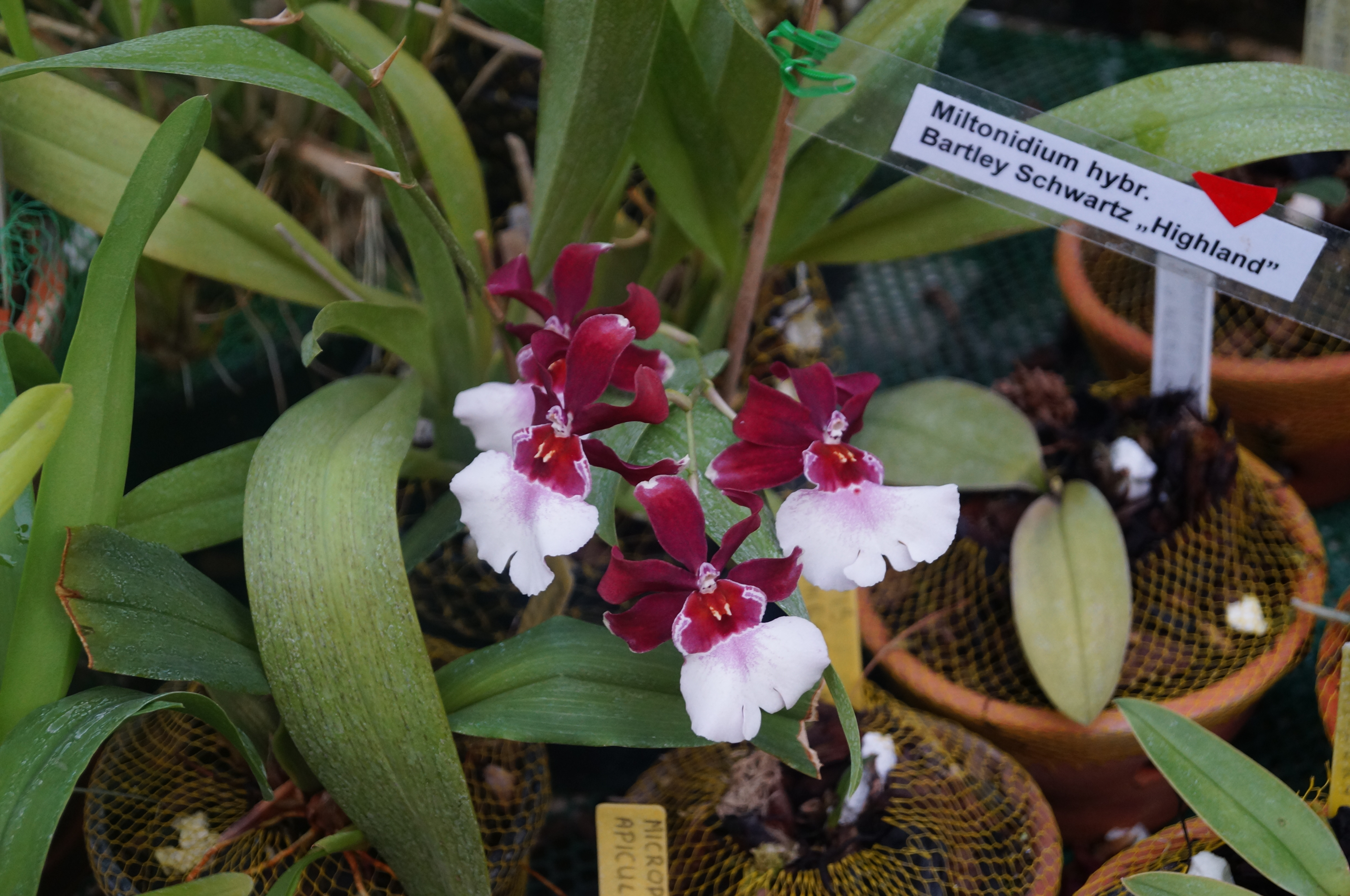 Ogród Botaniczny UJ w Krakowie